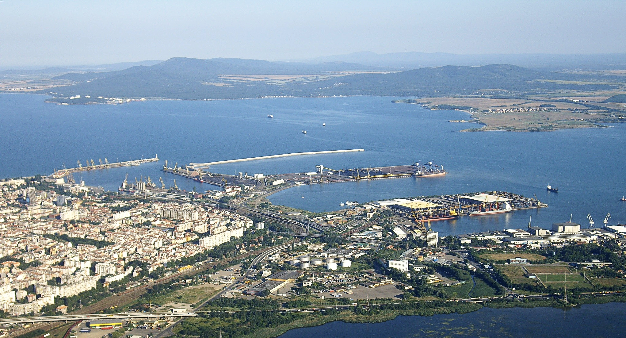 Burgas, Bulgarien: der Burgas-See im Vordergrund, dahinter die Industriezone Nord, der Hafenkomplex und links davon der Stadtteil Wasraschdane und das Stadtzentrum. Im Hintergrund das Schwarze Meer sowie das Strandscha-Gebirge mit dem Gipfel Bakarlak (362 m).